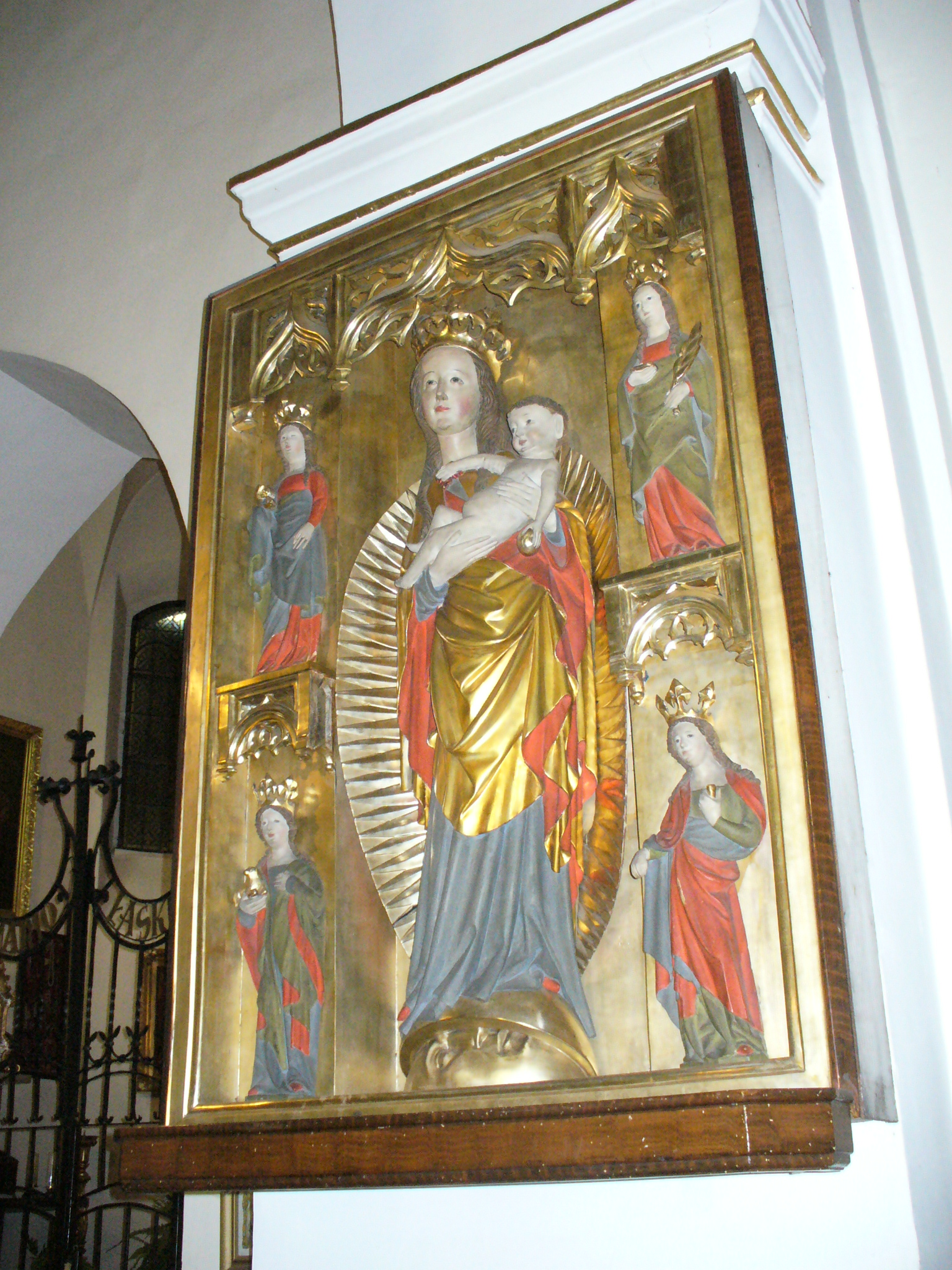 Tryptyk z XIV wieku w Kościele "na górce" w Opolu